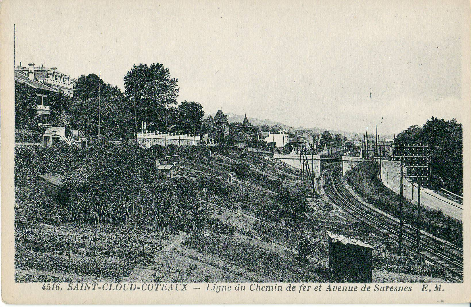 Carte postale éditée par EM N°4516SAINT-CLOUD-COTEAUX : Ligne du Chemin de fer et avenue de Suresnes et